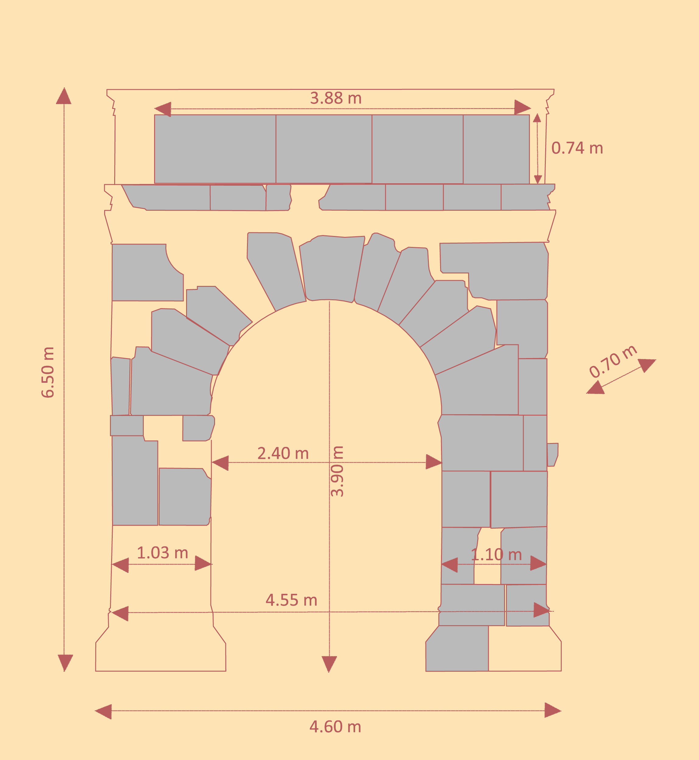 Dativius-Victor-Bogen in Mainz. Vereinfachte Umzeichung nach Frenz 1981.